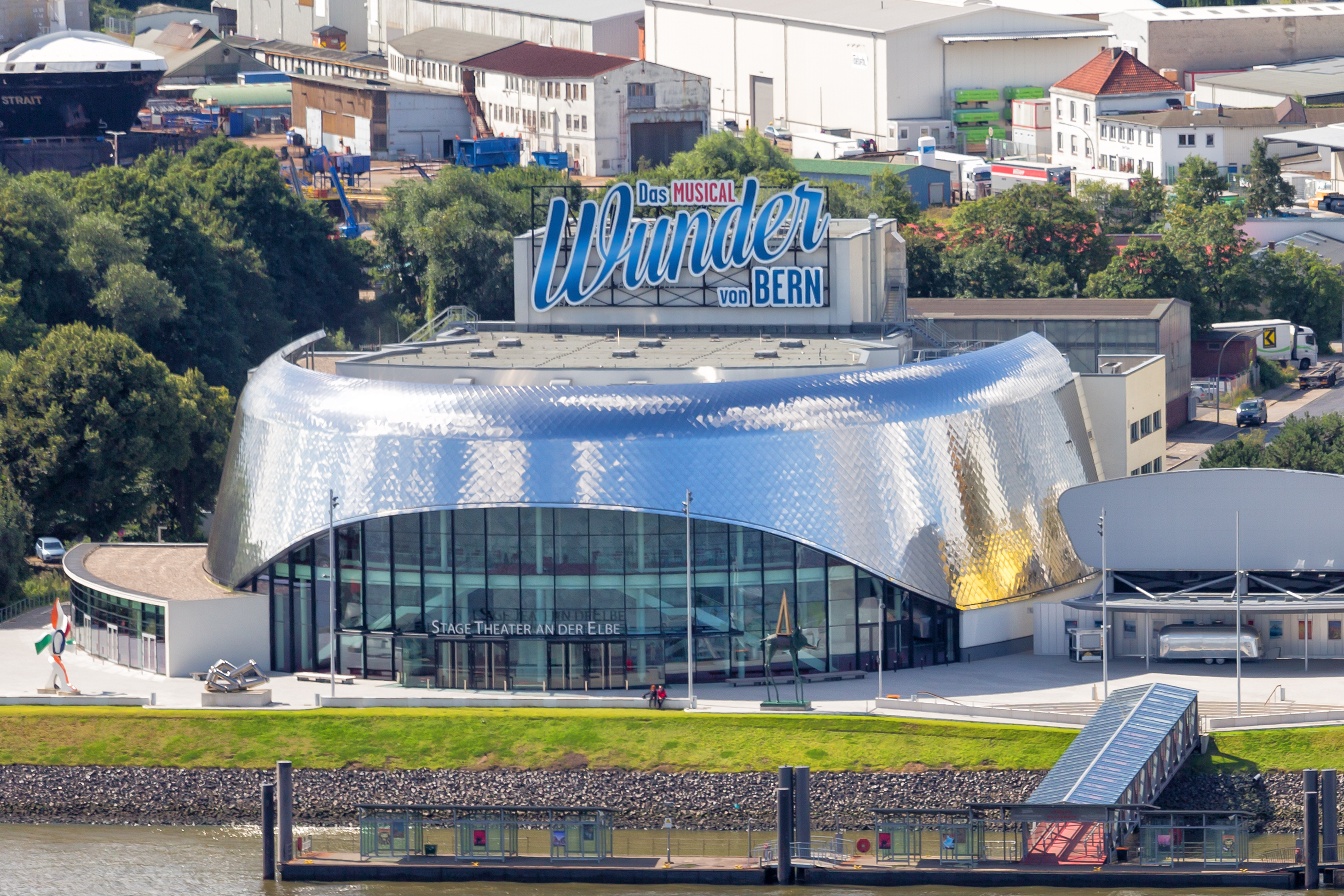 Theater an der Elbe in Hamburg, Heimat von "Das Wunder von Bern".